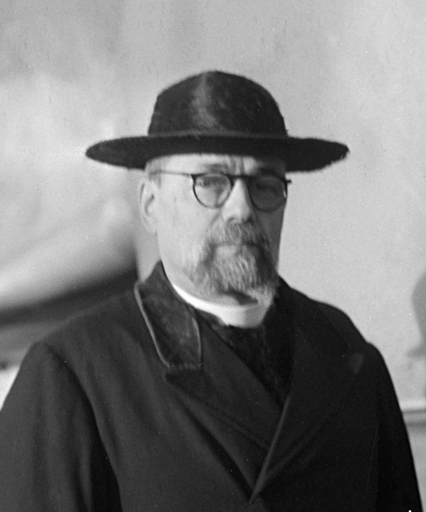 Dr. Jose da Costa Nunes, de Portugese aartsbisschop van Goa en Damao en patriarch van Oost-Indië, vertrekt vanaf Schiphol naar zijn diocees in India